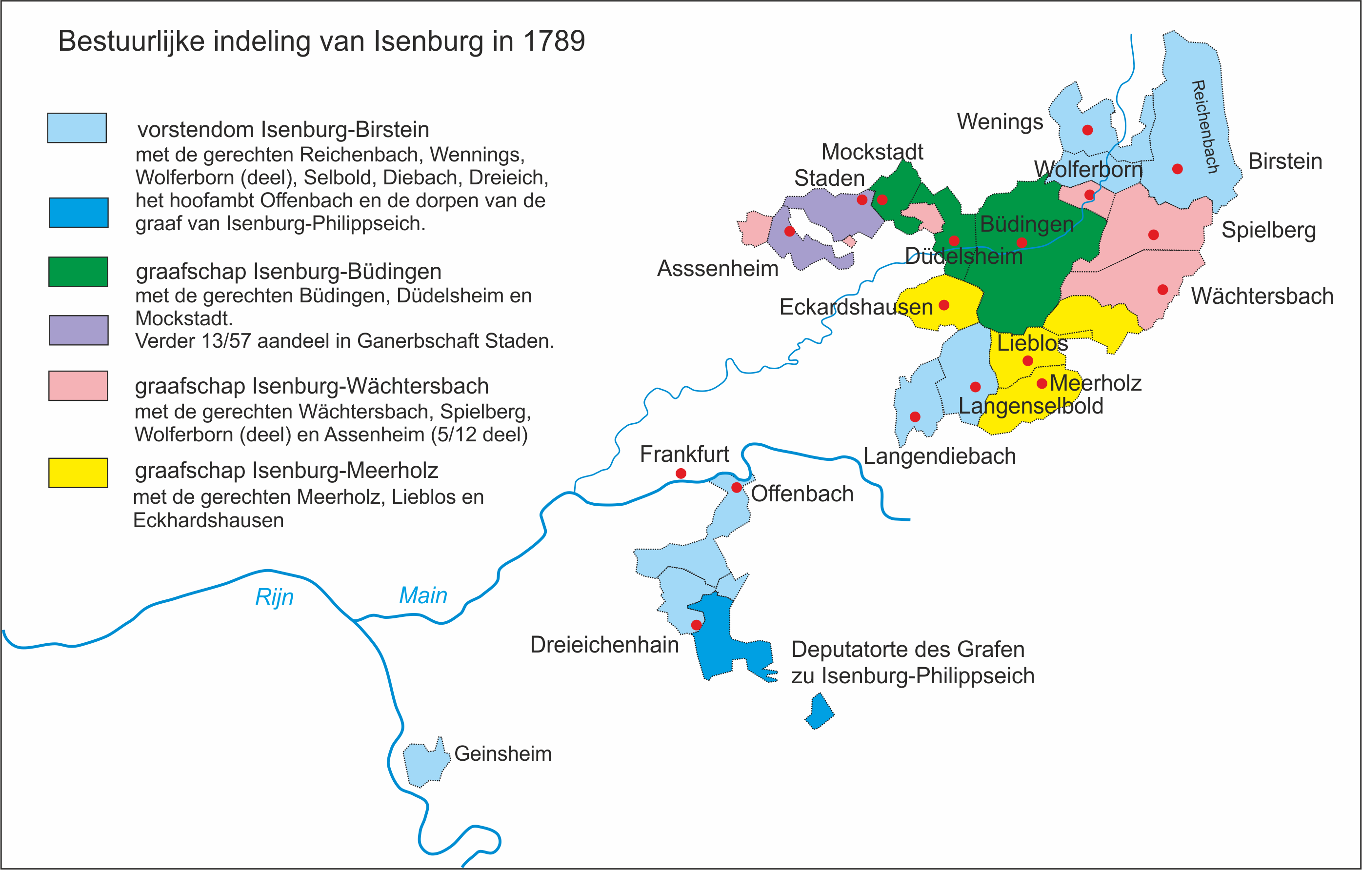 gemaakt op basis van de historisch atlas van Hessen